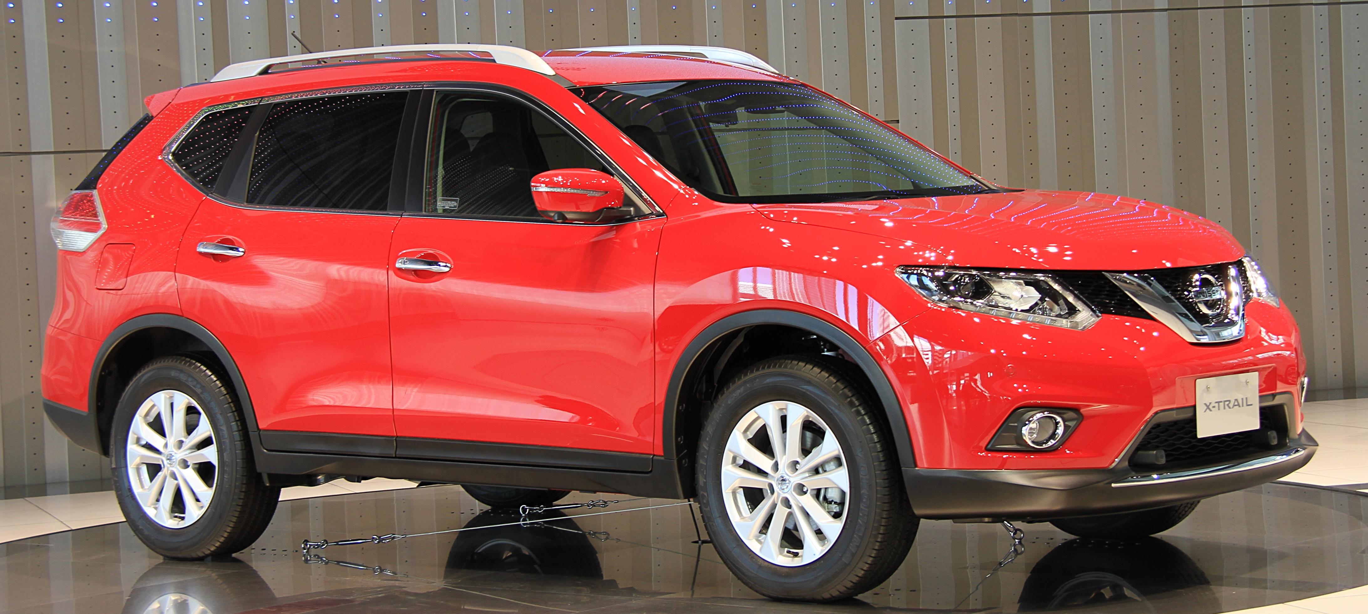 Nissan X-Trail